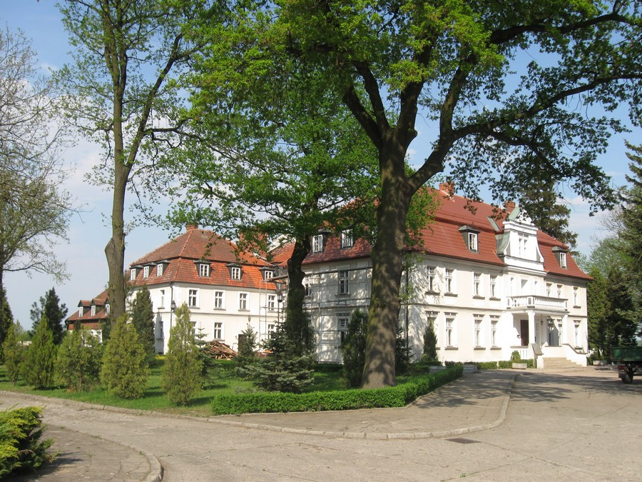 Mórkowo, pałac